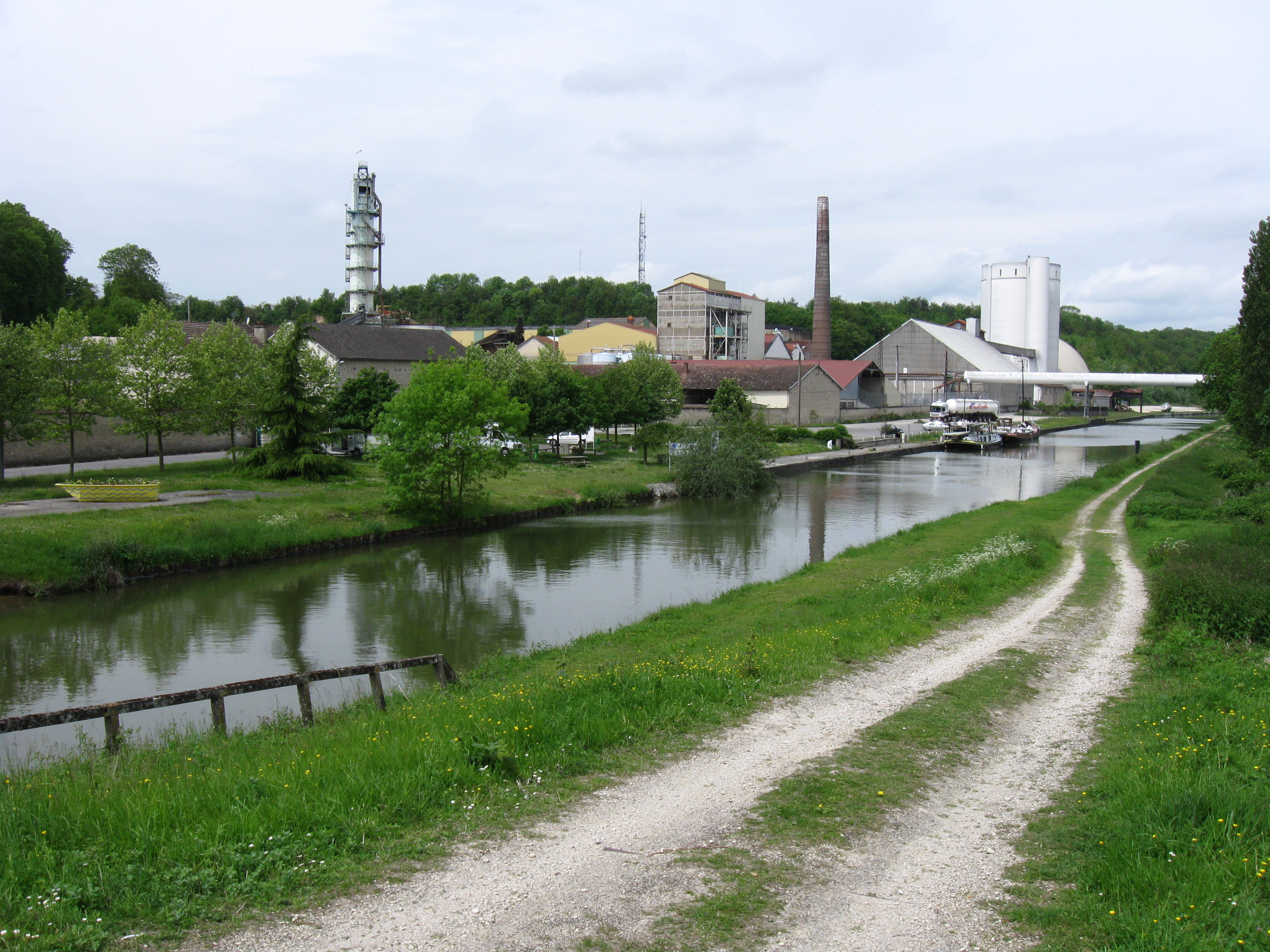 Sucrerie de Souppes et canal du Loing. (département de la Seine-et-Marne, région Île-de-France).